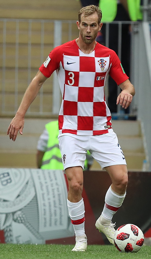 Уилл Смит, Гризманн, Модрич и кубок мира - в Москве прошёл финал ЧМ-2018